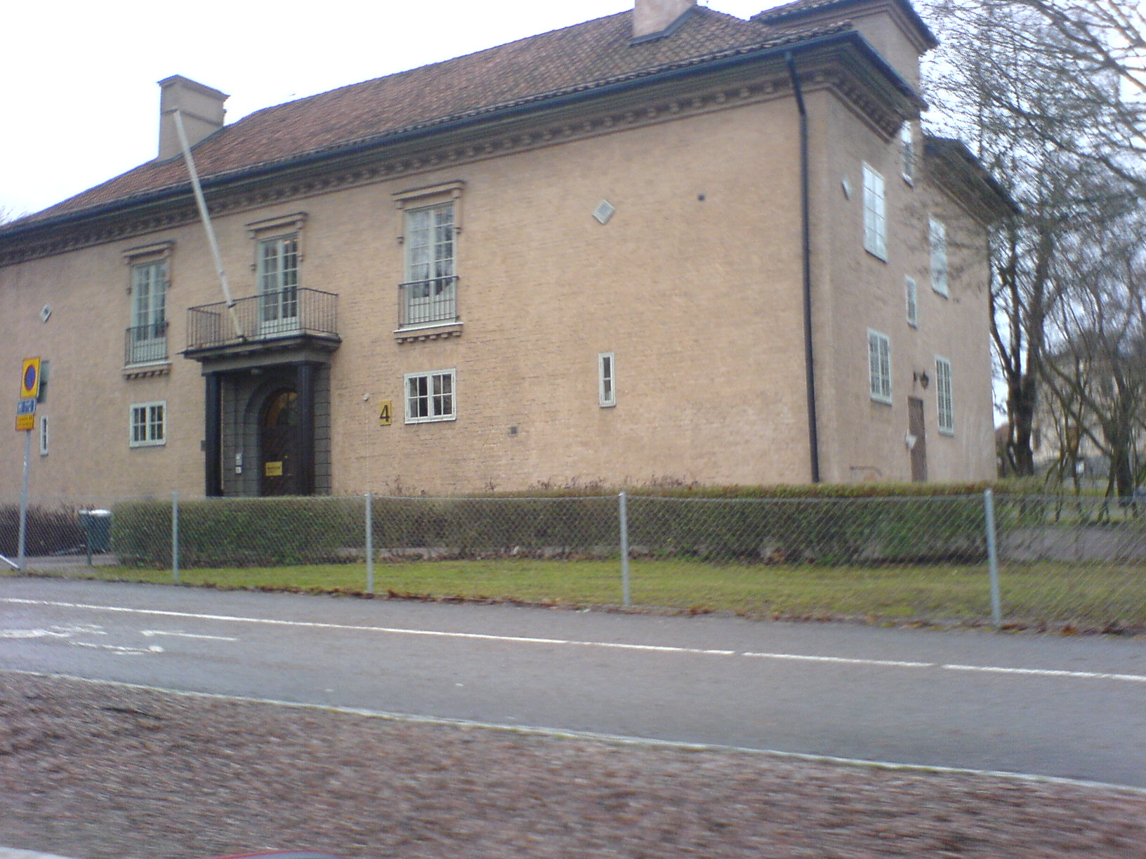 houses, uppsala - vasaparken / katedralskolan